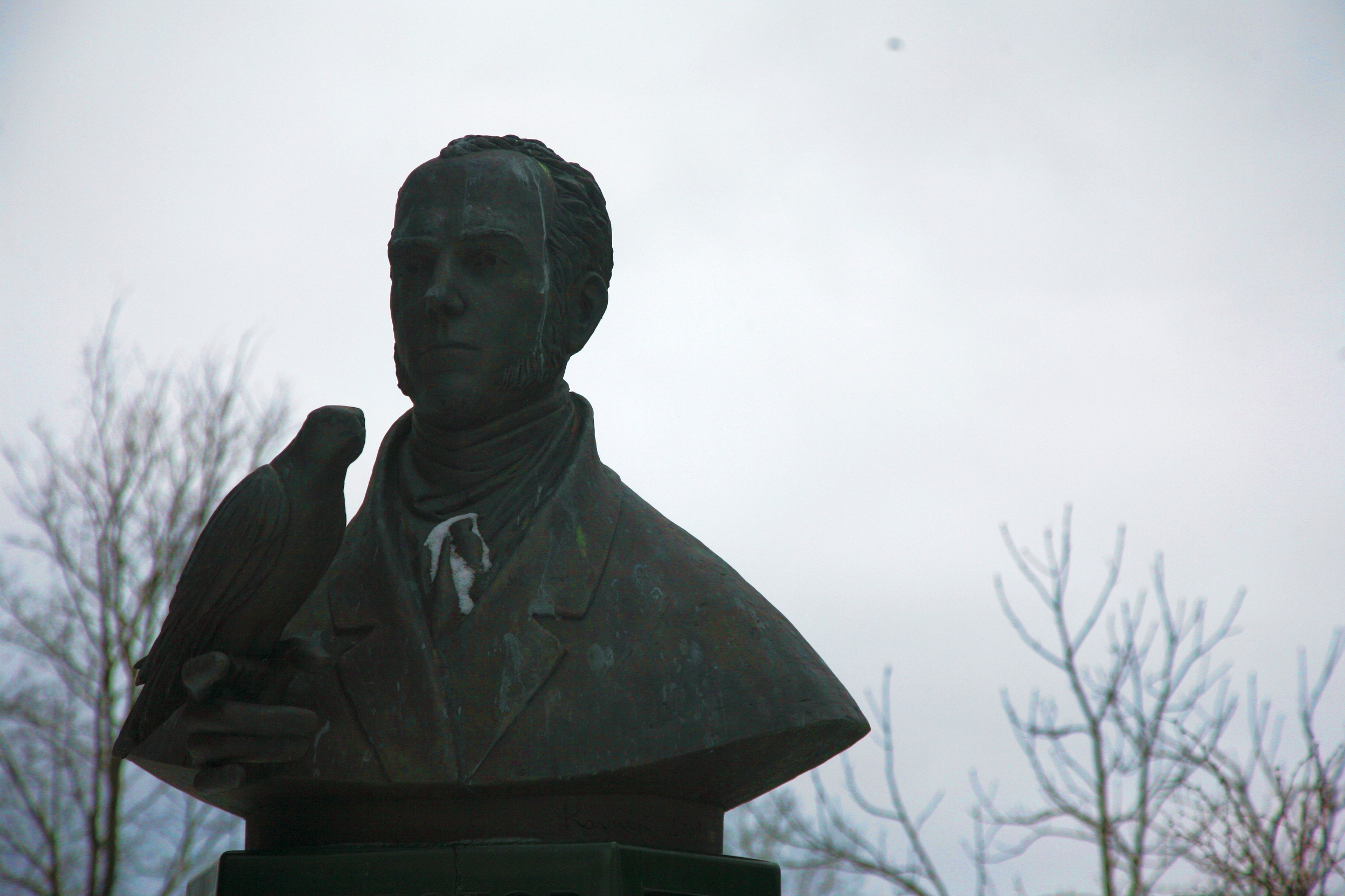 Botaanikaaia esimese direktori Germanni kuju Tartu botaanikaaias (büst), 3. veebruar 2013.